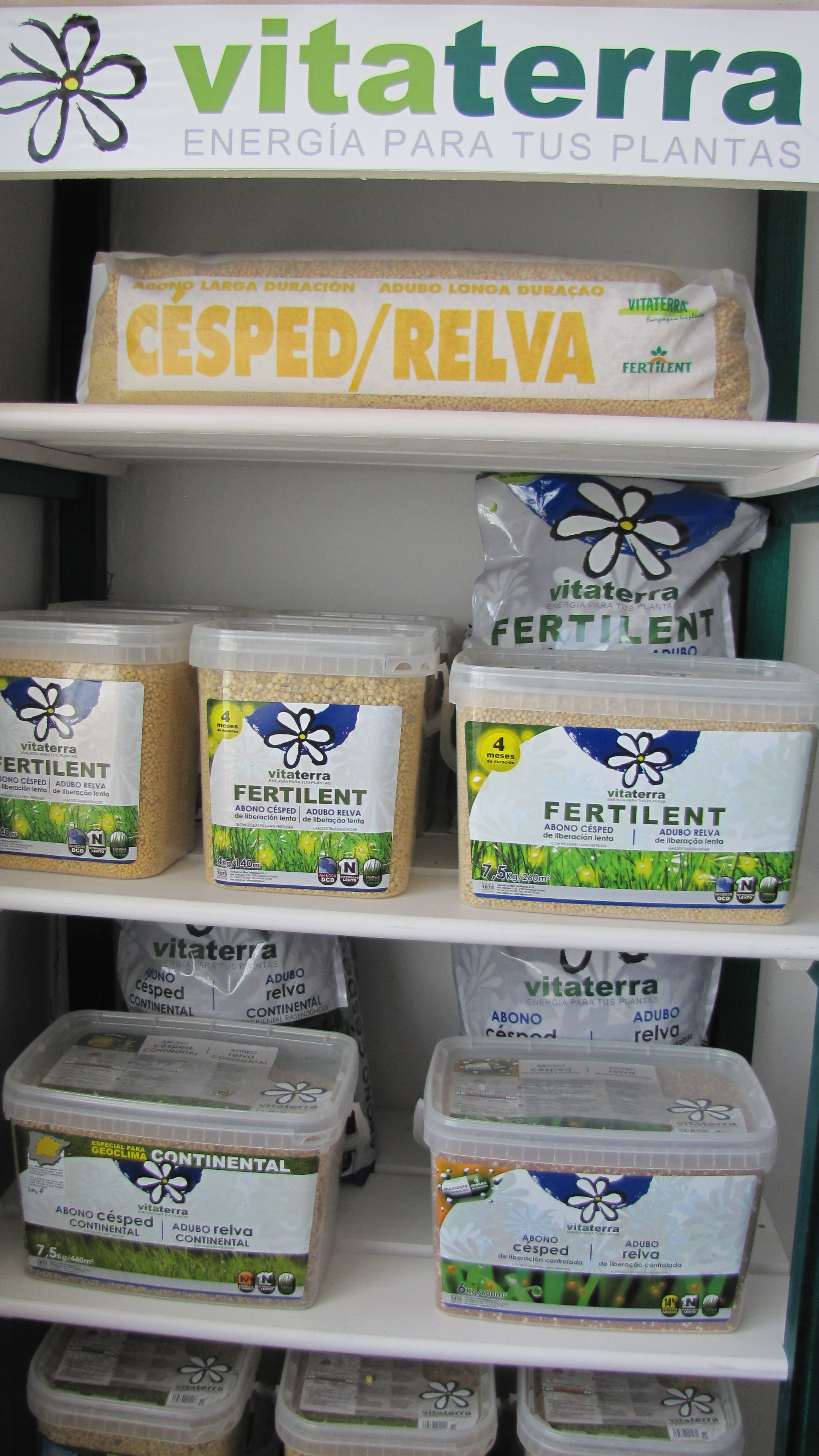 Exposición de varios abonos y fertilizantes para Cesped de Vitaterra.